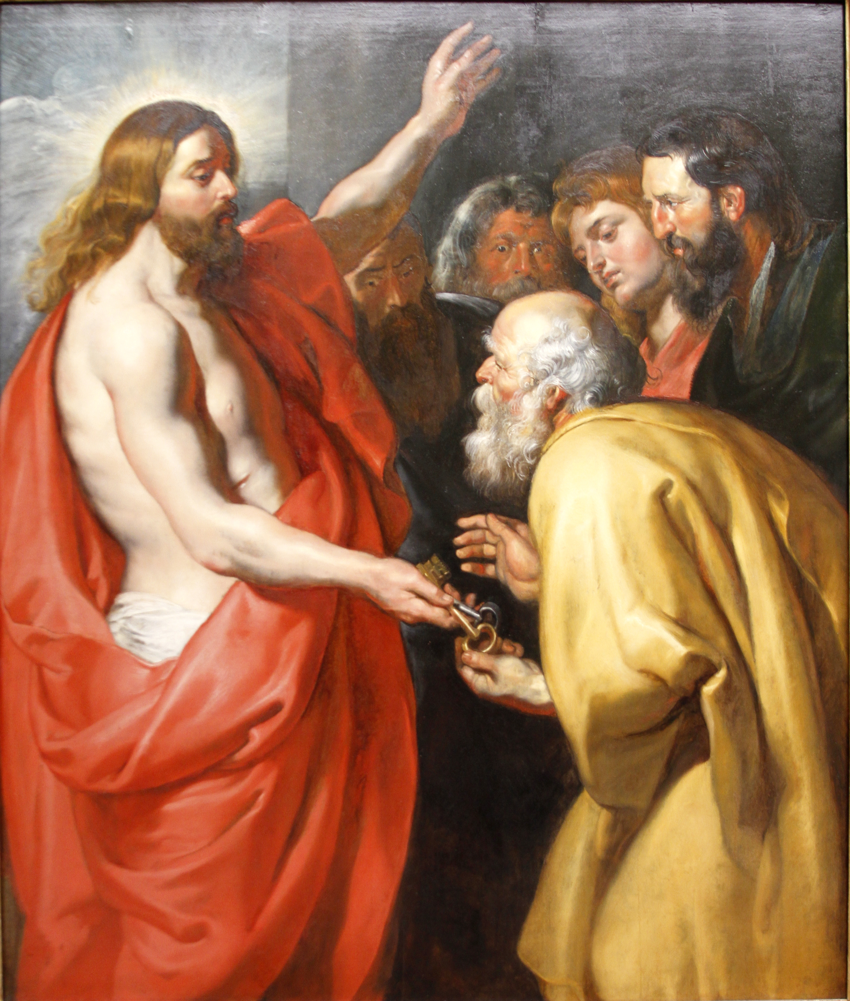 Gemäldegalerie - Berlin - Germany